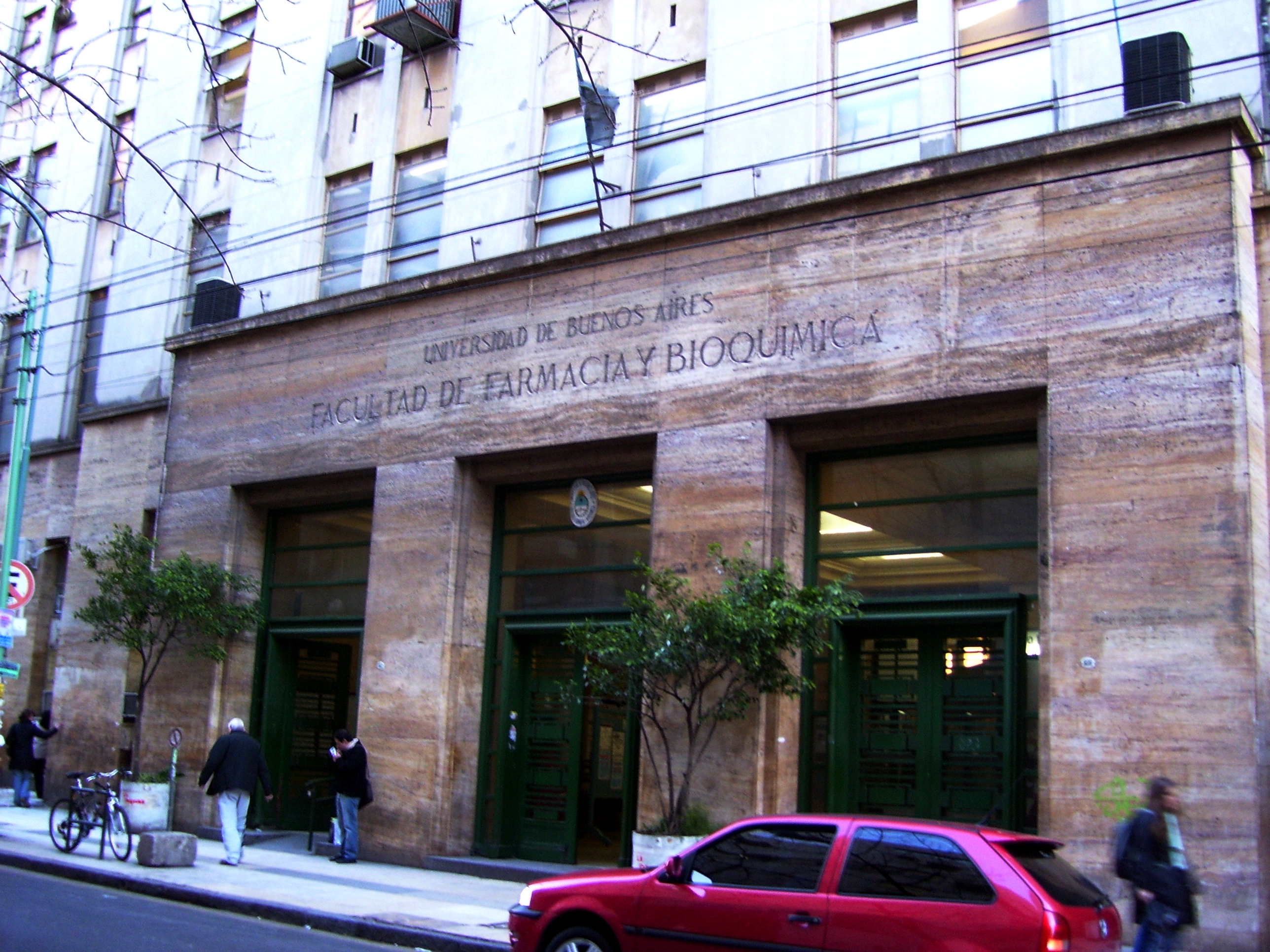 Facultad de Farmacia y Bioquímica. Universidad de Buenos Aires